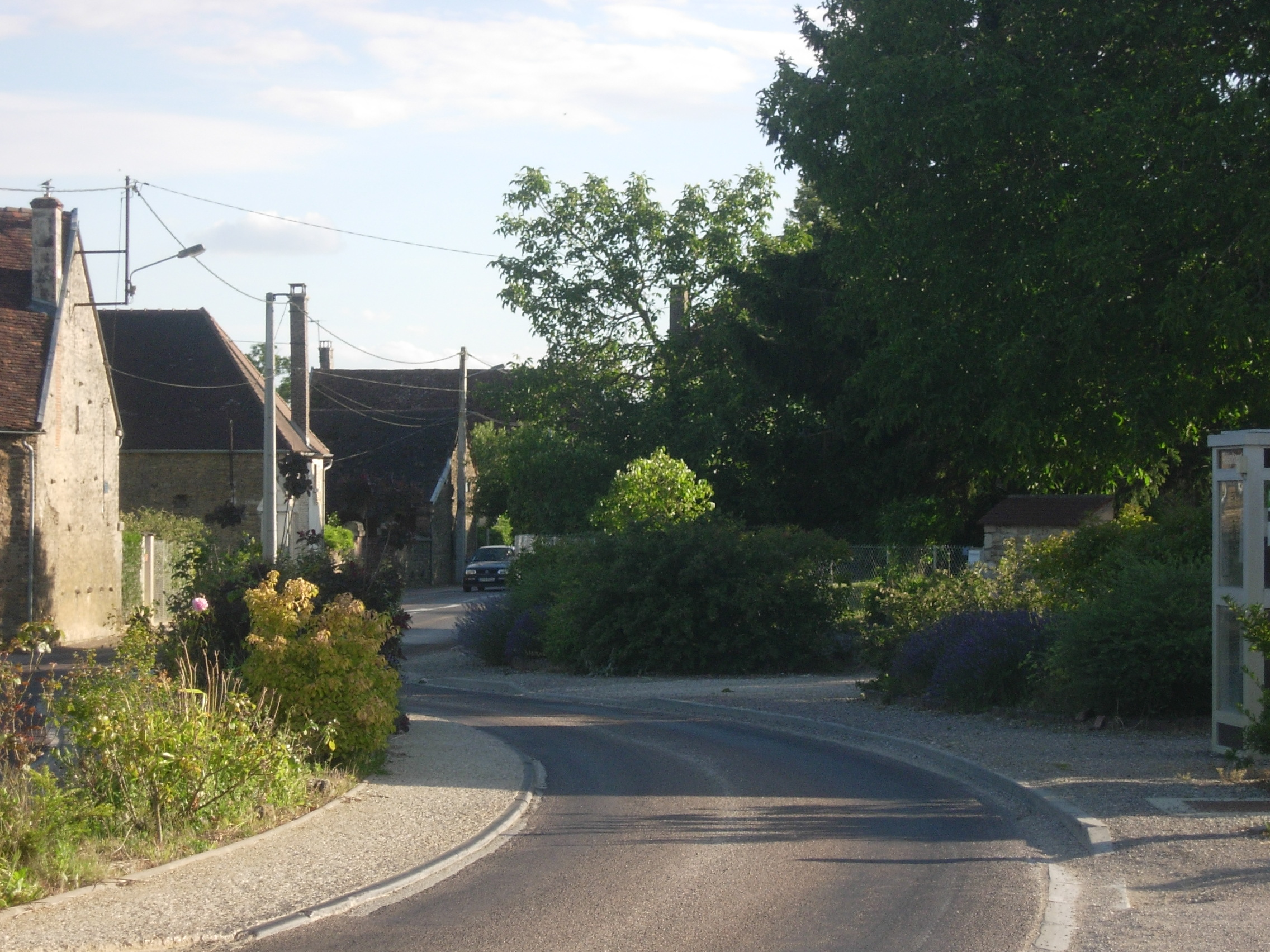 vue du village de Prusy (Aube)